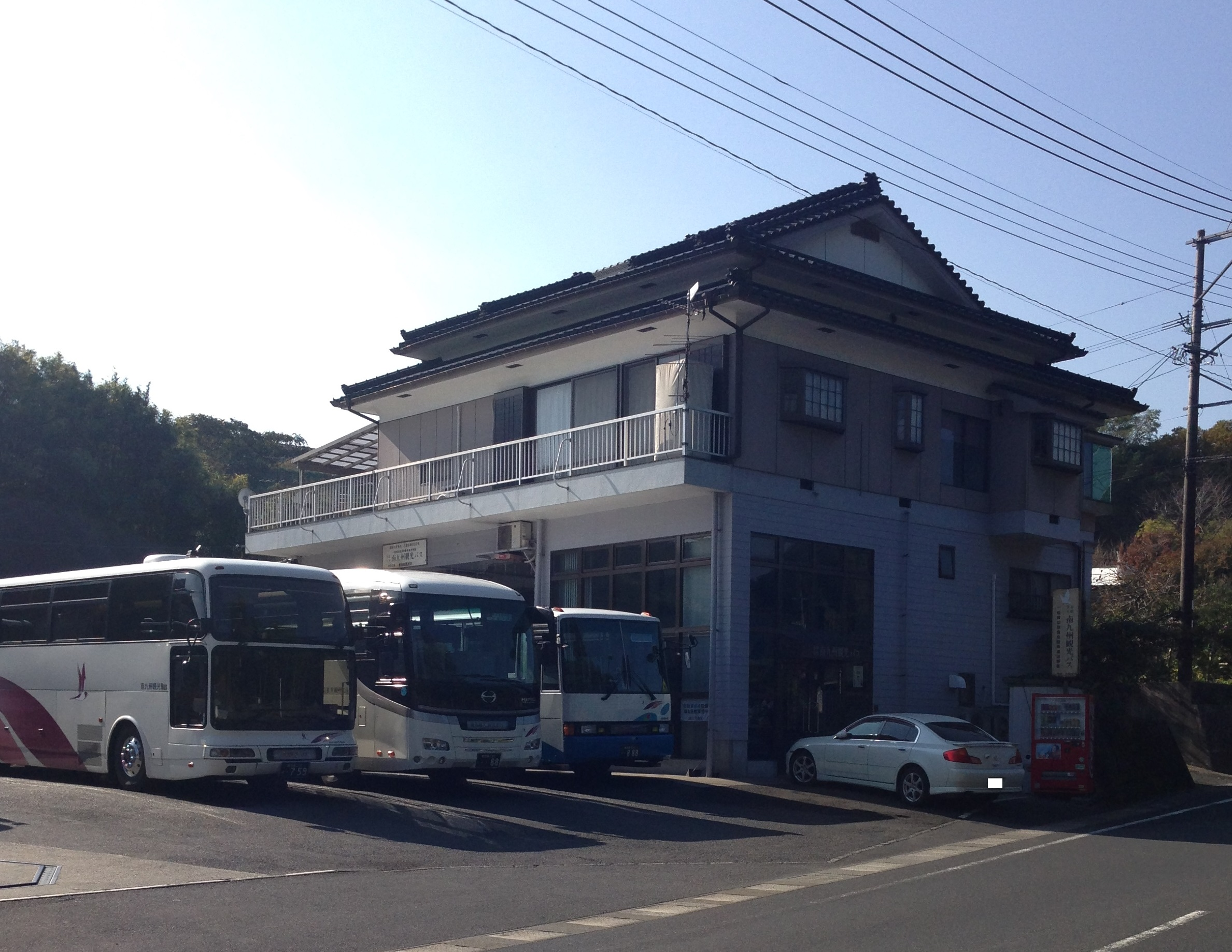 南九州観光バスの本社。